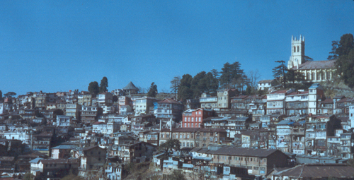 Shimla, Himachal Pradesh, Indien